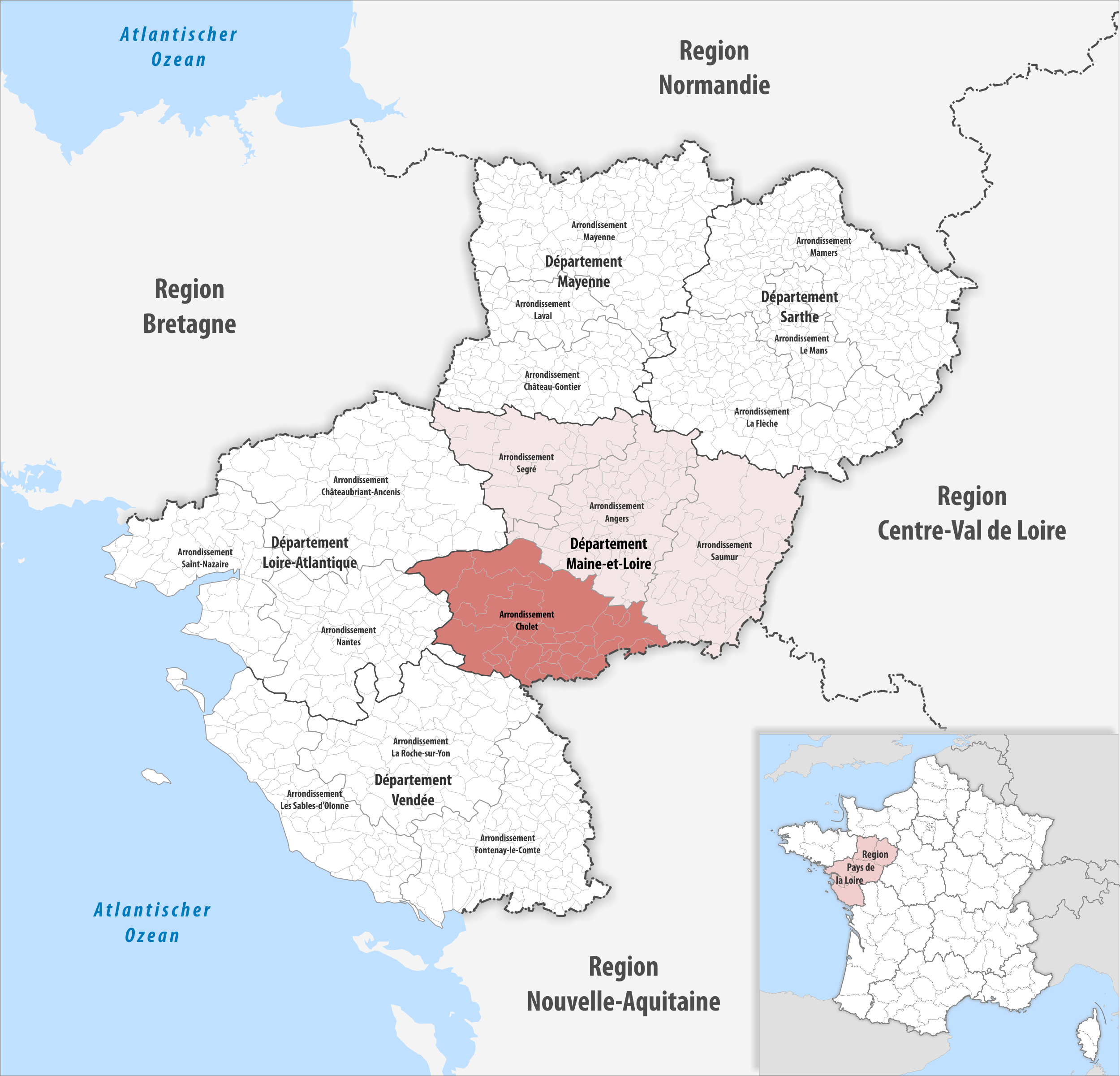 Lage des Arrondissements Cholet